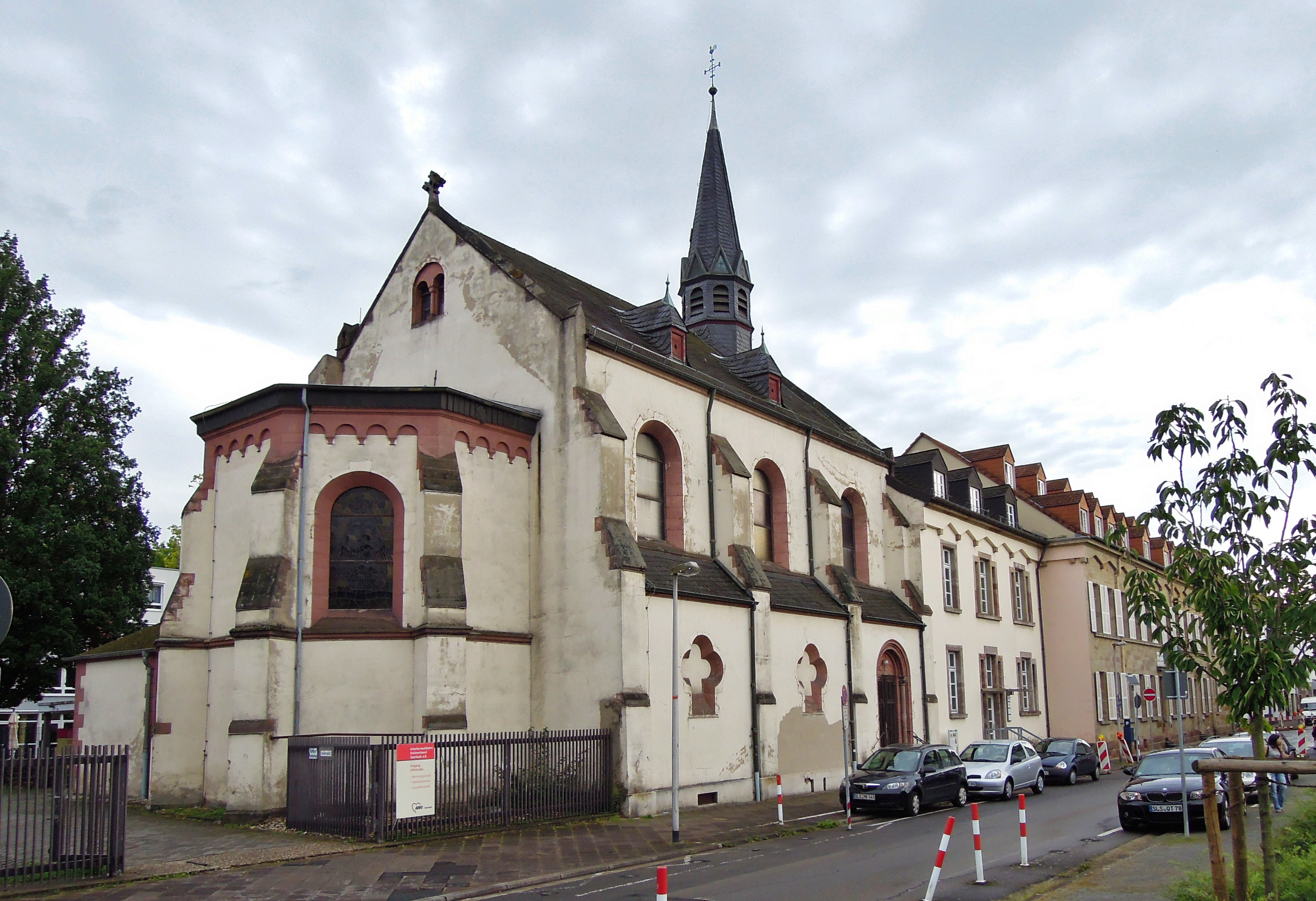 Stiftstraße 14-18, 1900/01 Anbau Krankenkapelle von Wilhelm Schmitz (Einzeldenkmal)